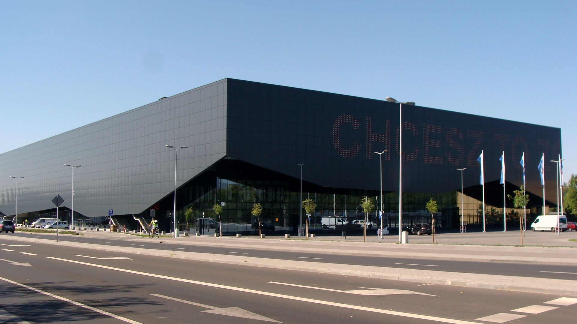 Hala sportowo-widowiskowa w Toruniu